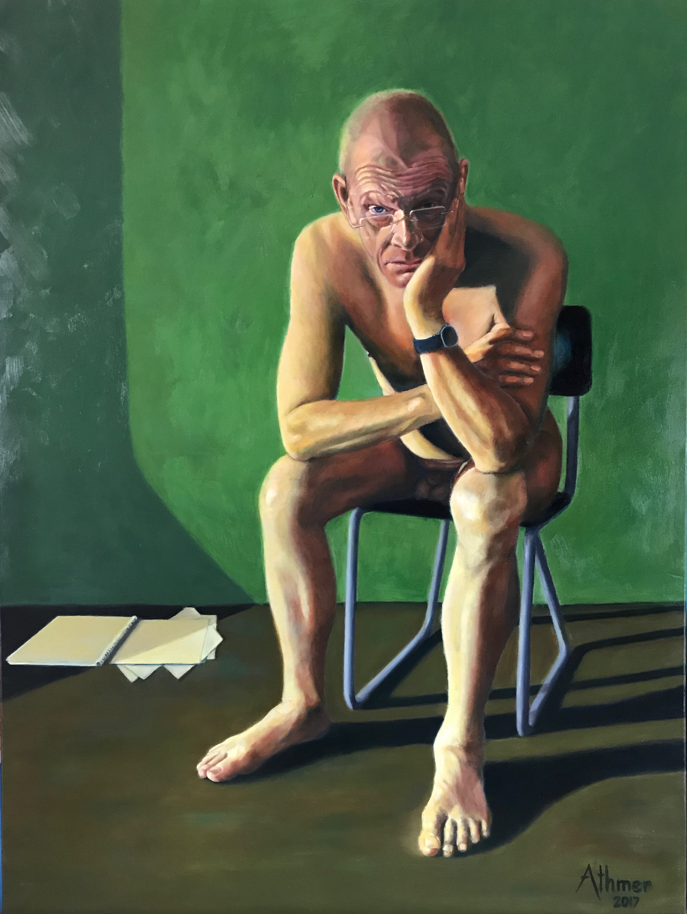 Gerardjan Rijnders geschilderd door Pieter Athmer. Olieverf op doek, 90x120cm. Sinds 6 mei 2018 onderdeel van de portrettengallerij in de Stadsschouwburg Amsterdam.